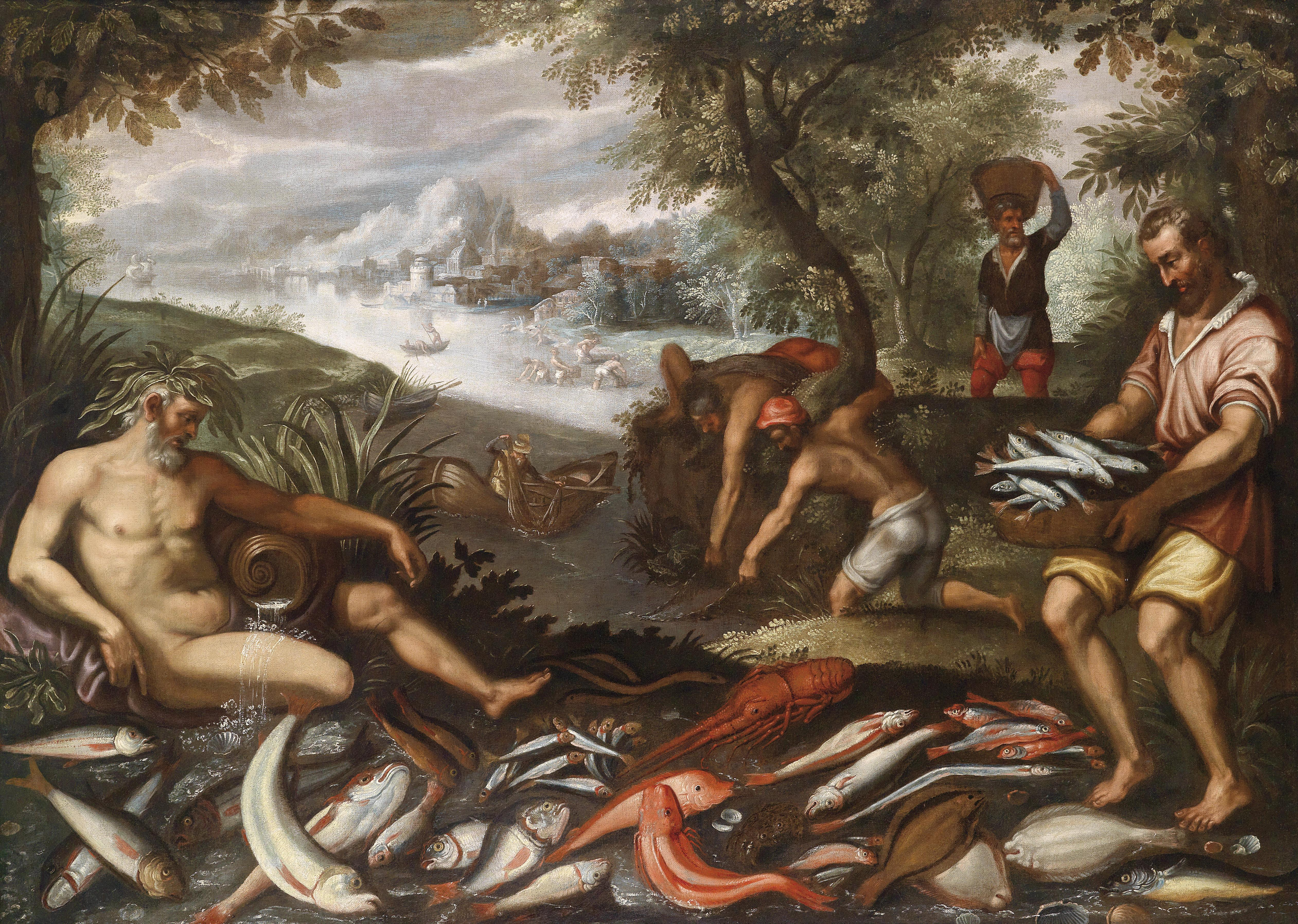 Allegorie des Wassers